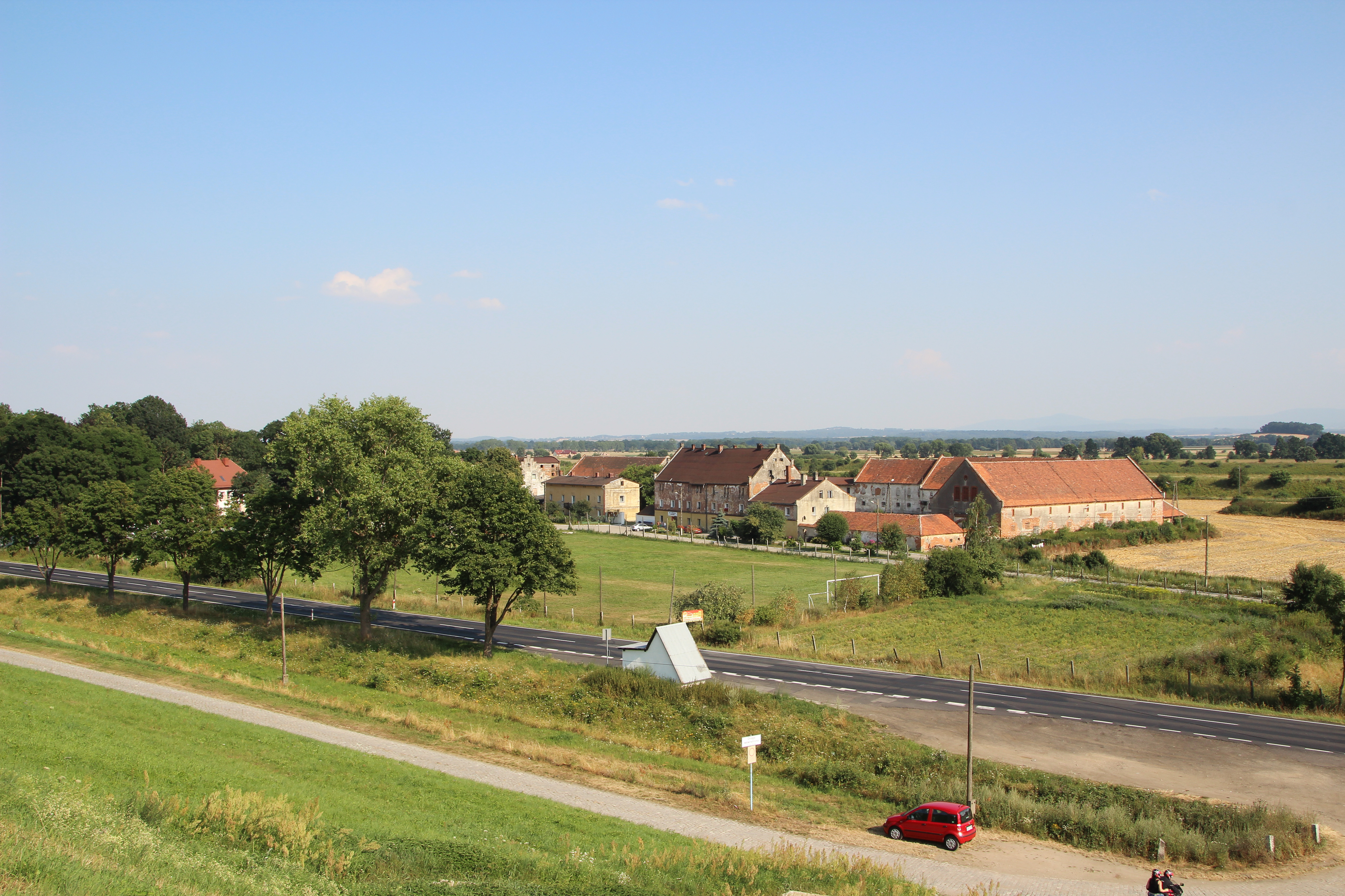 Frydrychów – wieś w Polsce, w województwie opolskim, w powiecie nyskim, w gminie Paczków.